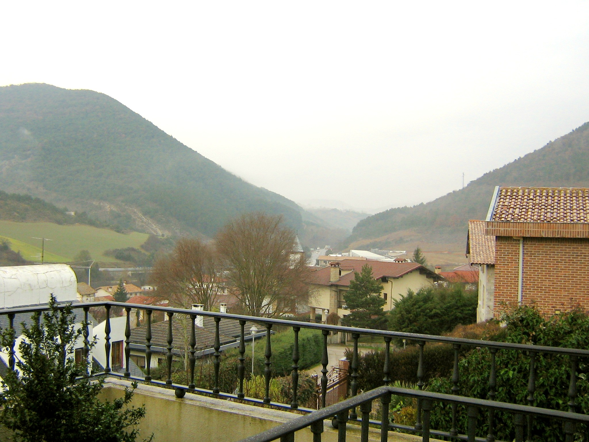 Vista del pueblo Sorauren(navarra),tomada desde la parte alta el dia 2007-01-08